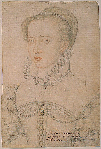 Portrait de Diane de La Marck, duchesse de Bouillon